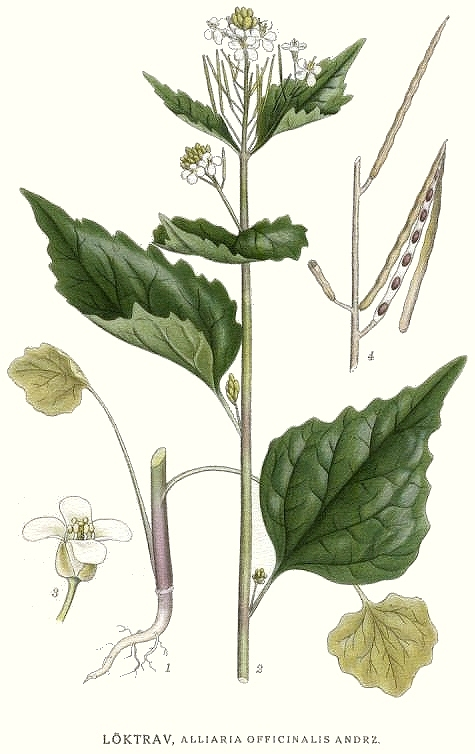 Alliaria petiolata (M. Bieb.) Cavara & Grande Original Description Löktrav, Alliaria officinalis Andrz.